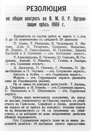 Резолюция на Кюстендилския конгрес на ВМОРО.